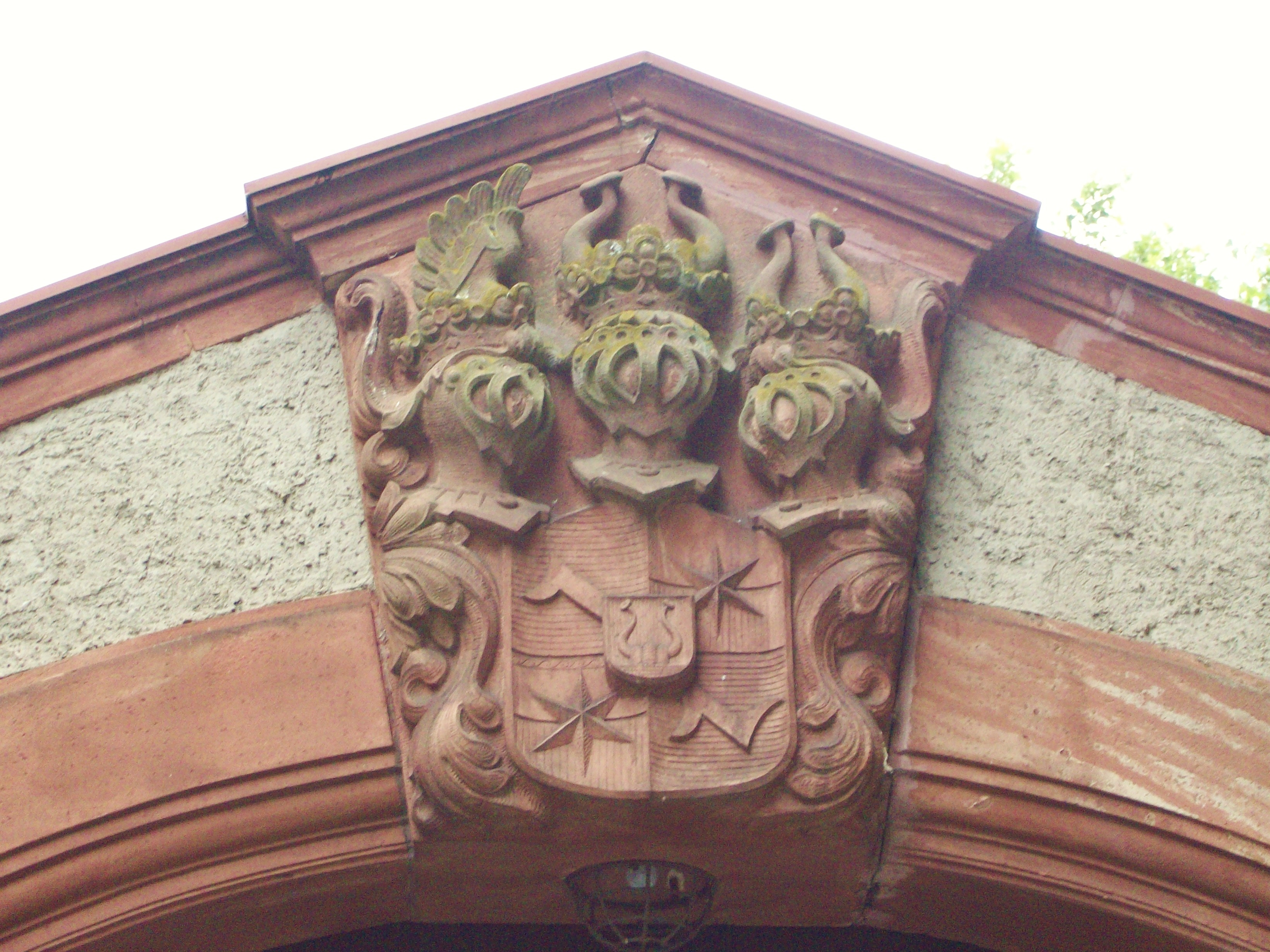 Detail des Toreingangs von Schloss Ernsthofen: Das Wappen